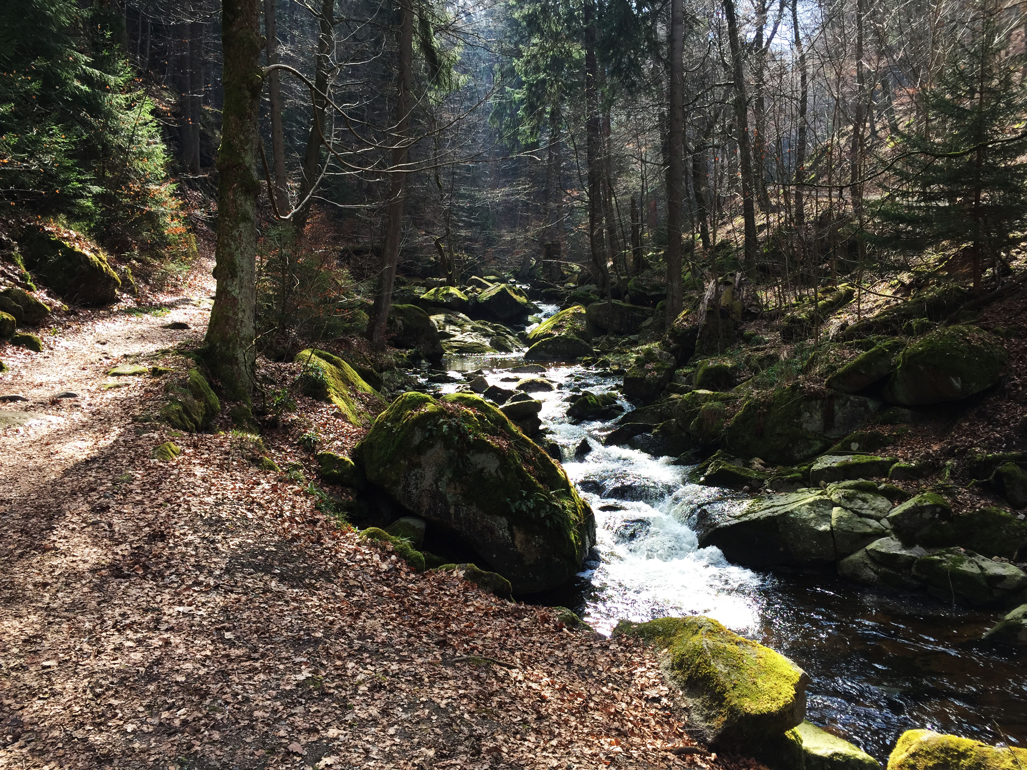 Ilse im Harz nahe Ilsenburg